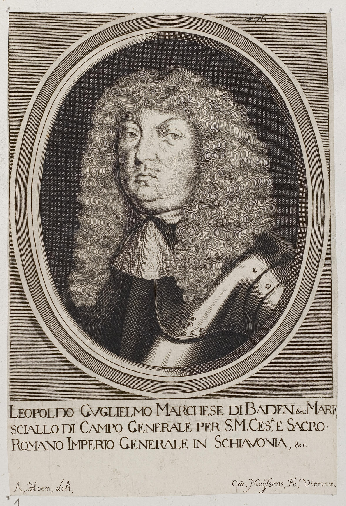 Grafik aus dem Klebeband Nr. 2 der Fürstlich Waldeckschen Hofbibliothek Arolsen Motiv: Leopold Wilhelm von Baden-Baden, kaiserlicher Feldmarschall